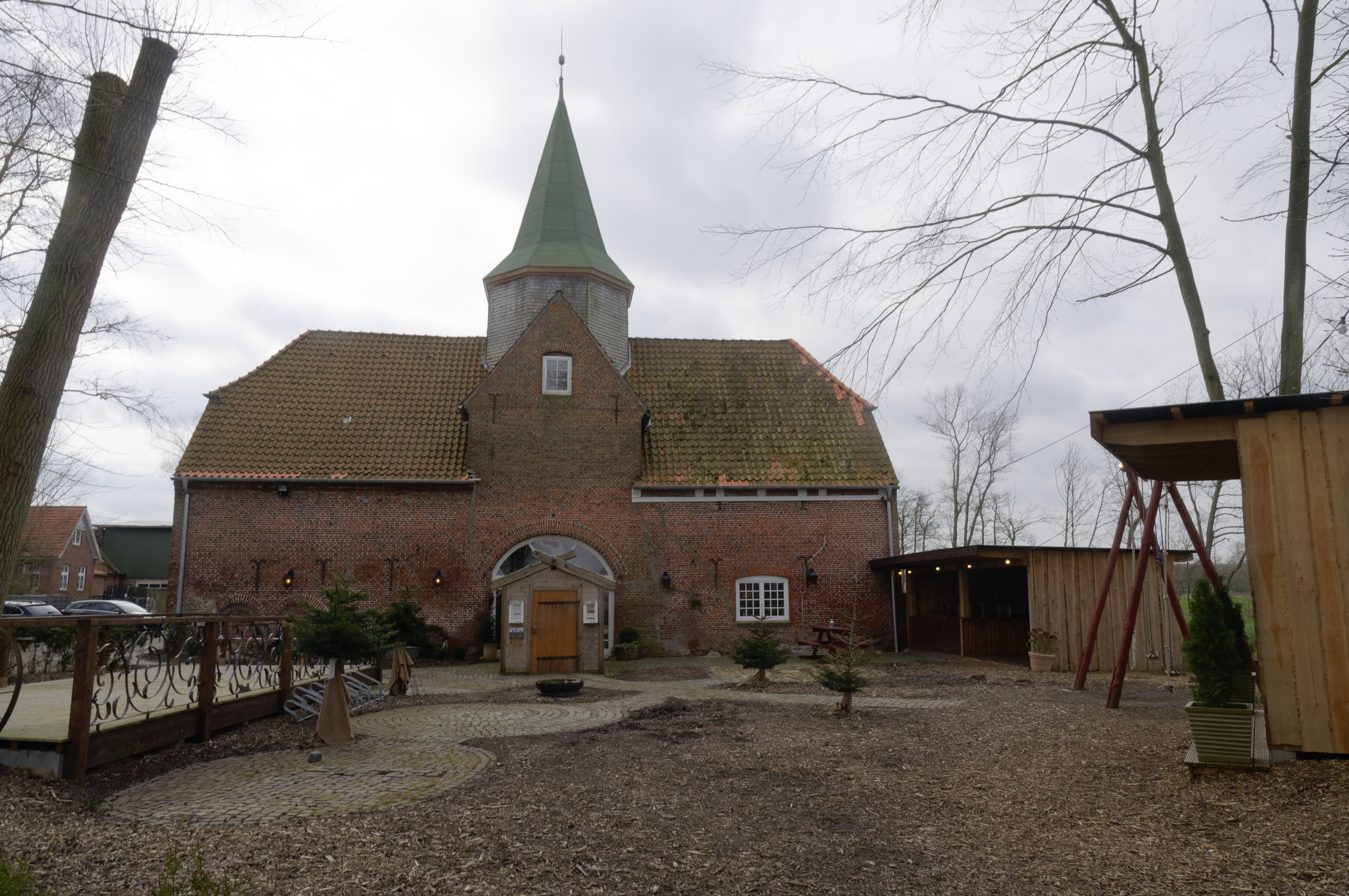 Cuxhaven Altenwalde -mix- 2020